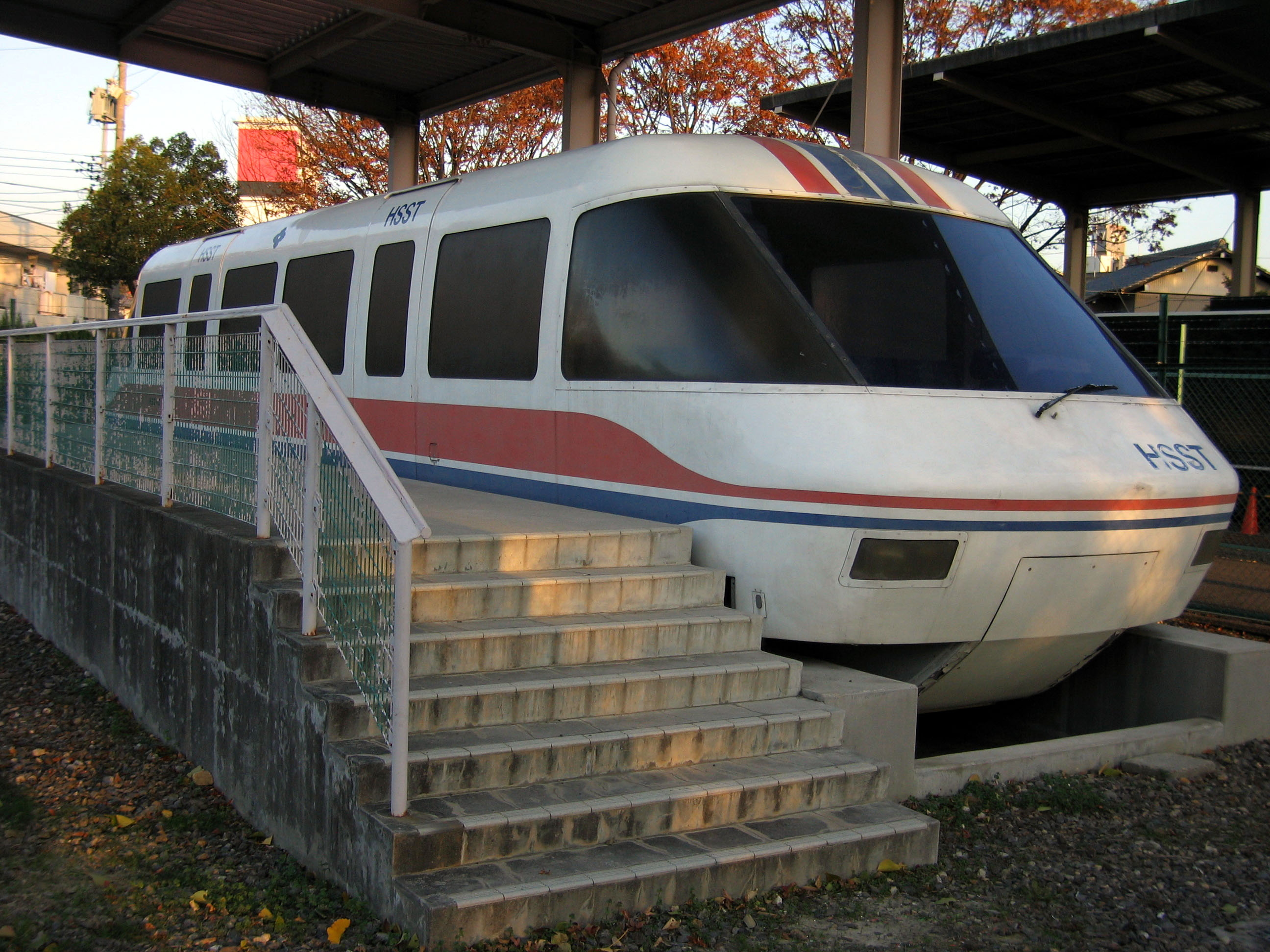 HSST is Japanese Maglev. HSST-03 in Okazaki Minami Park.